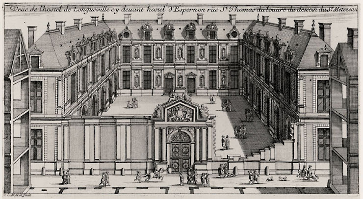 Jean Marot l'Ancien (Français, 1619-1679) d'après un dessin de Clément II Métezeau (Français, 1581-1652): Veüe de l'hostel de Longueville cy devant hostel d'Espernon rüe St. Thomas du Louvre du dessein du Sr. Metezeau, signé en bas à gauche: I. Marot fecit. Ancien Hôtel de Longueville (démoli en 1833), alors situé entre l'ancienne rue Saint-Thomas du Louvre et la rue Saint-Nicaise (toutes deux détruites par l'agrandissement du Palais du Louvre). Hötel cedé en 1663 à la duchesse de Longueville; les jardins furent occupés par les Coches de Versailles en 1739; acquis par les fermiers généraux en 1749 pour y établir une annexe (Bureau général des tabacs dit aussi Annexe de la Ferme générale, Ferme du tabac, Régie des droits réunis; utilisé comme salle de bal sous le Direcctoire, puis par les Ecuries impériales.[1] ↑